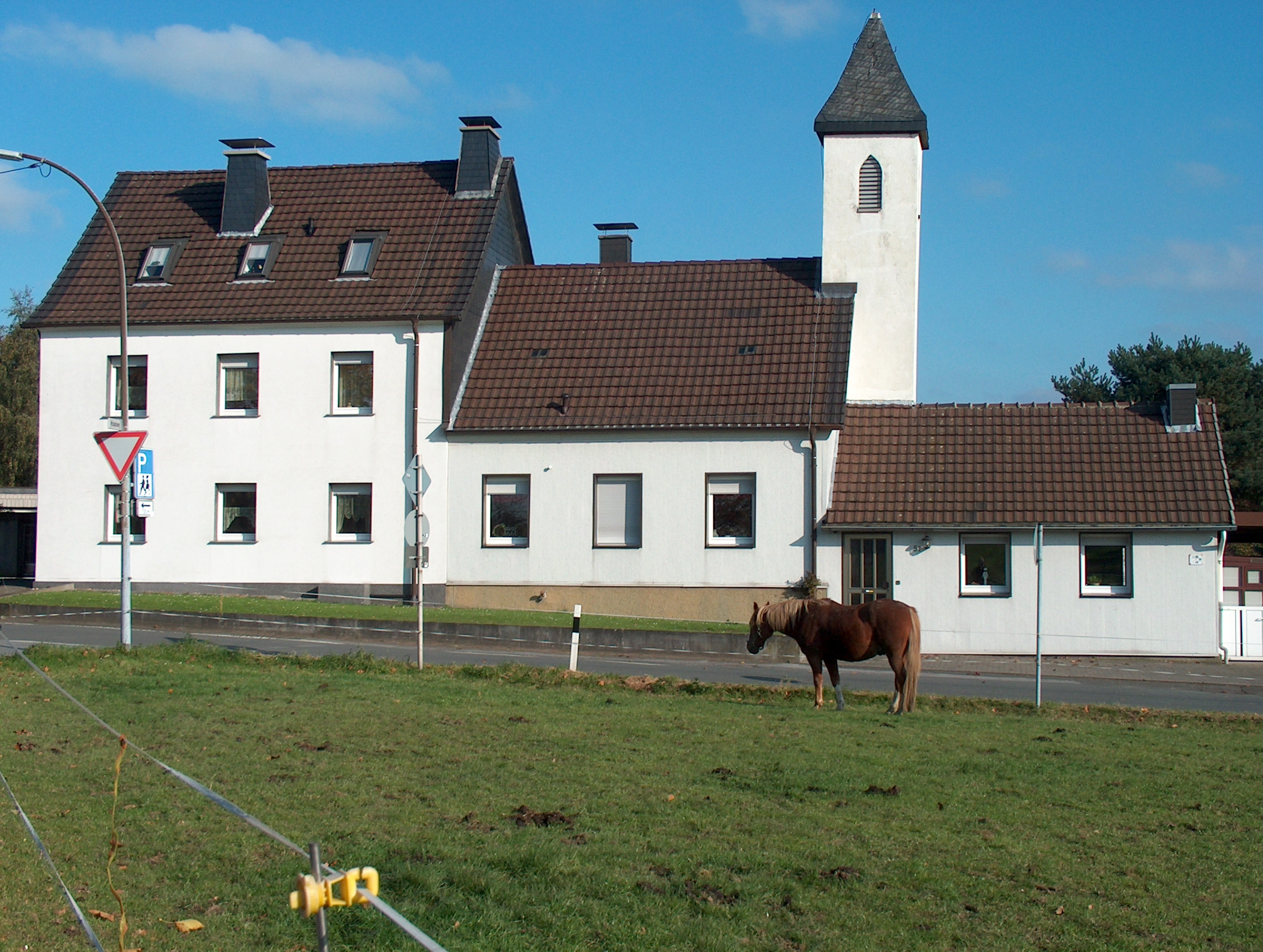 Die ehemalige einklassige "evangelische Volksschule Reingsen zu Bürenbruch" (jetzt im Privatbesitz). Links: das Lehrer-Wohnhaus, mitte: das Klassenzimmer, rechts: die Toiletten,dahinter der Glockenturm. (Zum Unterrichtbeginn wurde die Glocke geläutet)